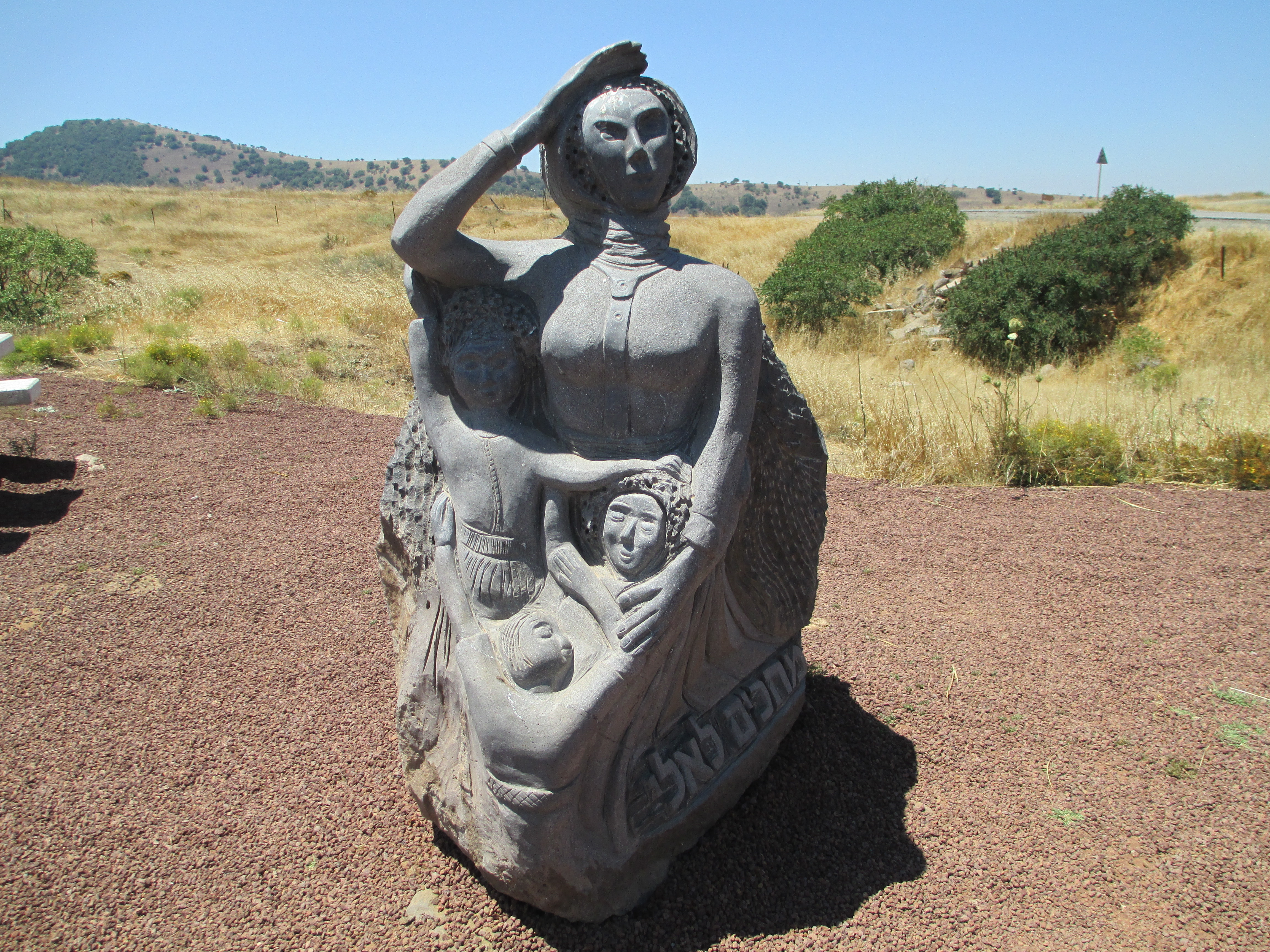 הפסל "מחכים לאלי" ברמת הגולן